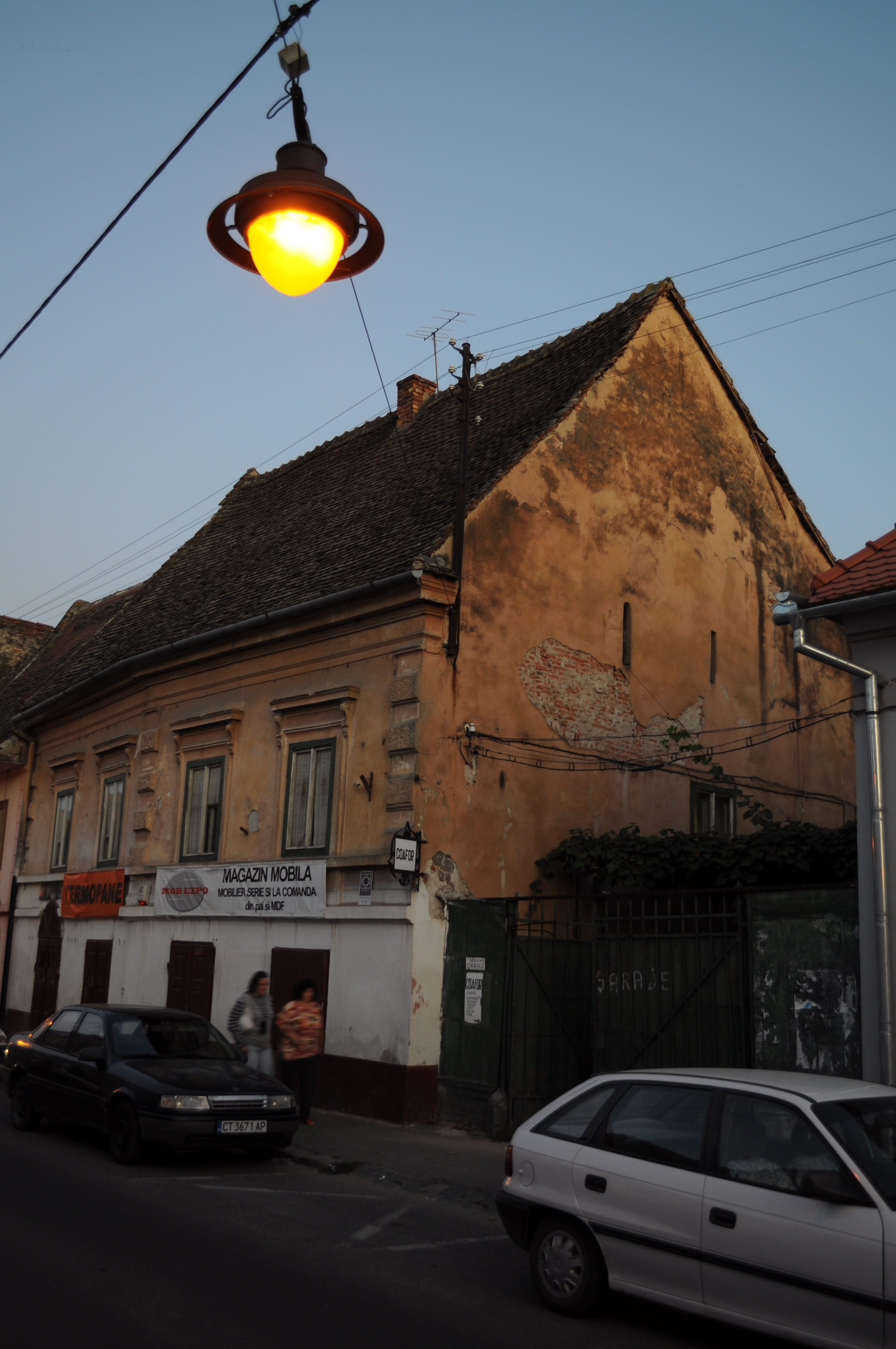 Casa, Str. 9 Mai 30, vedere frontal-dreapta